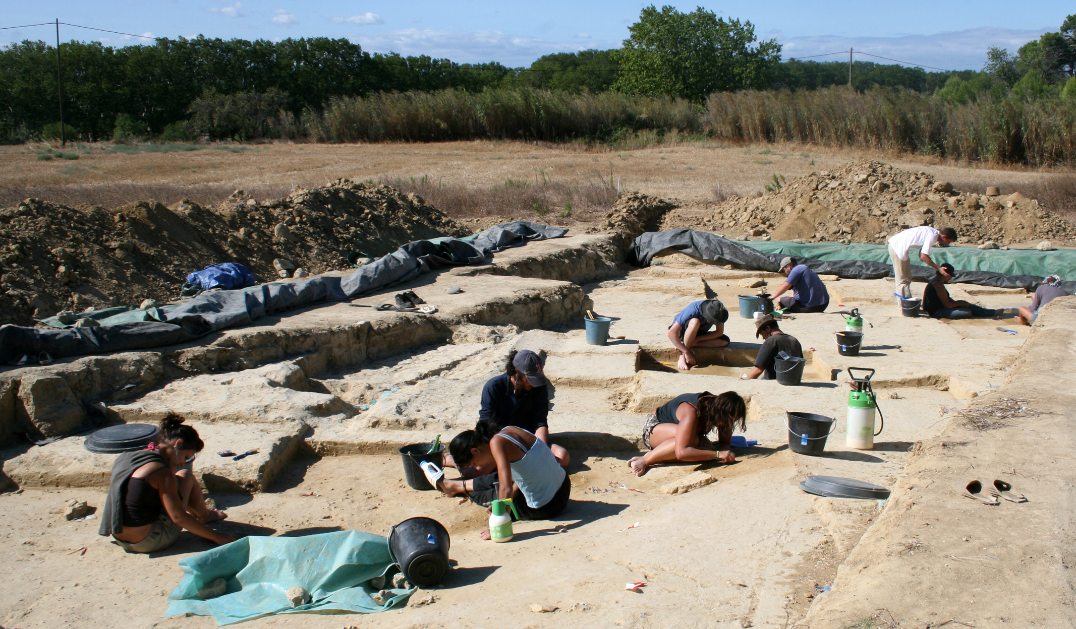 site archéologique de Régismont-le-Haut (Poilhes, Hérault, France) lors de la campagne de fouille 2010